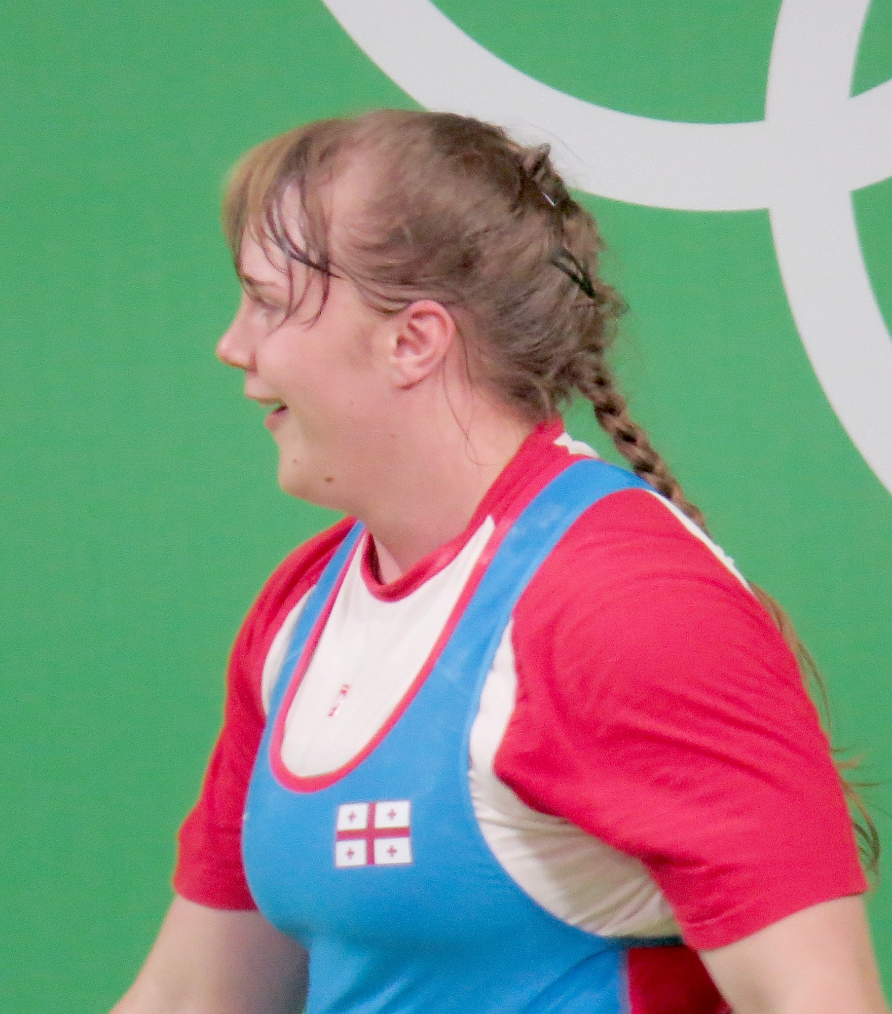 Anastasiia Hotfrid